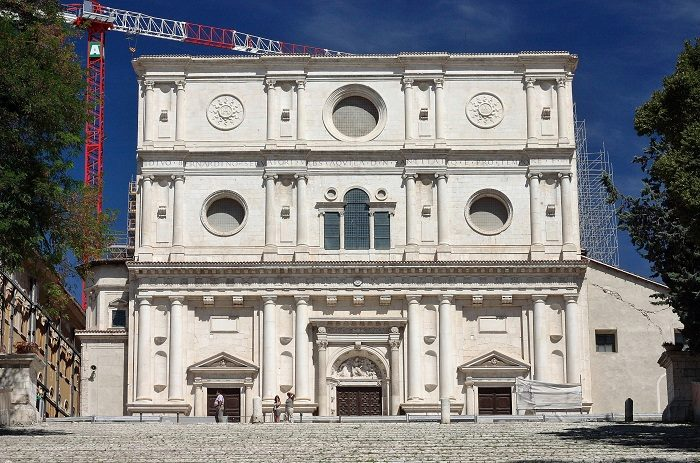 La facciata della basilica di San Bernardino in una fotografia di Marco Equizi.